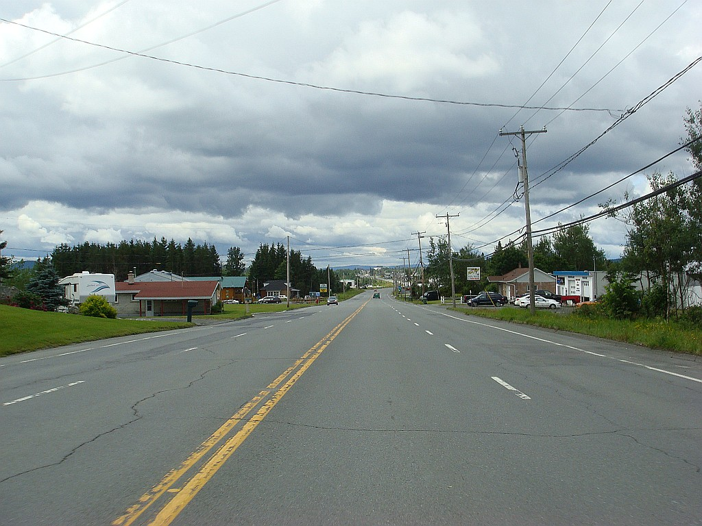 Photo de la route 112, à Thetford Mines, Québec, Canada.